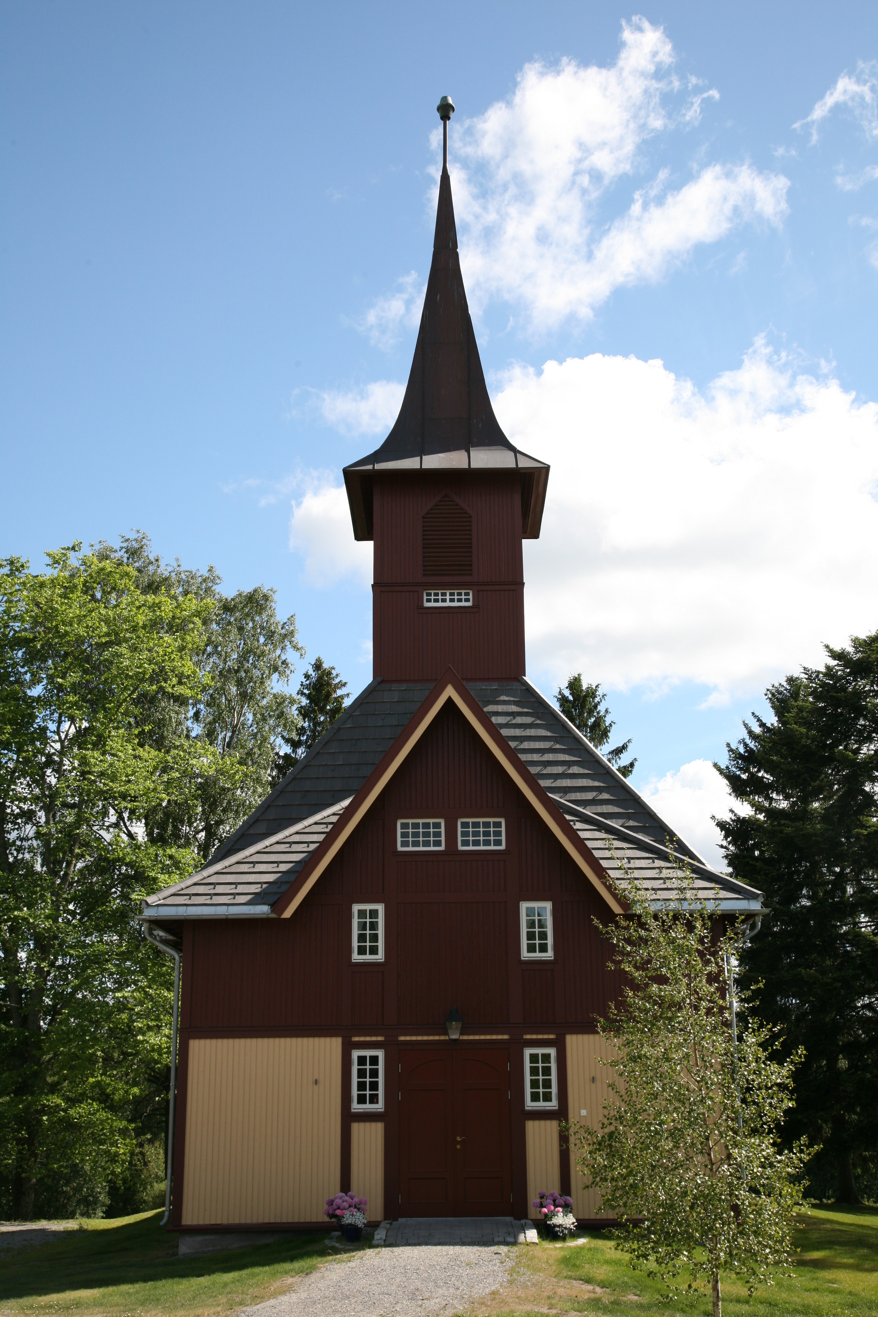 Dalen church in Fet, Akershus, Norway